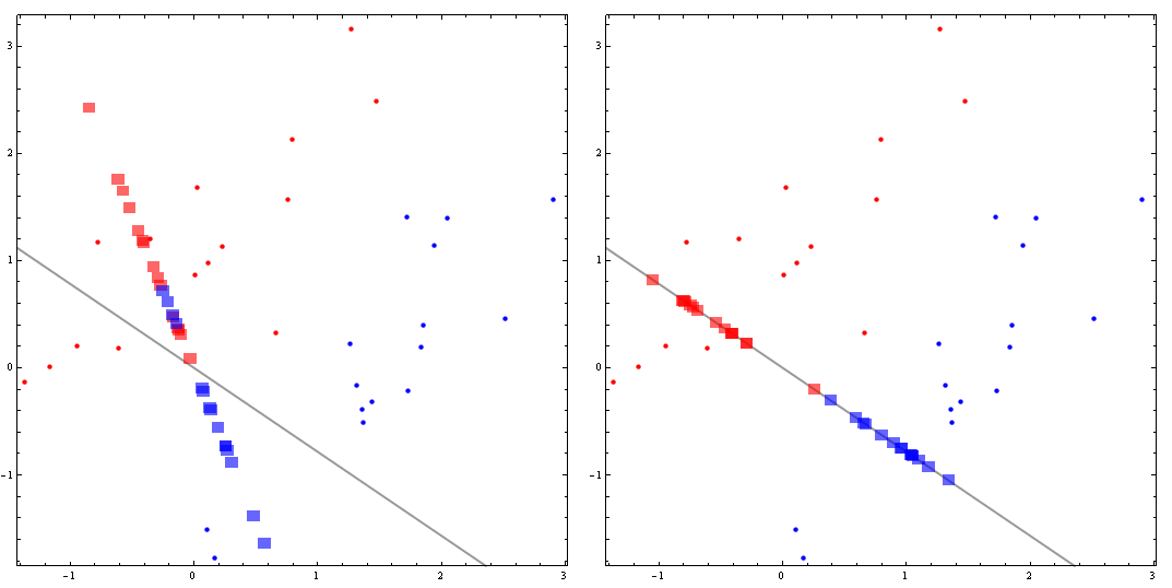 Obrázek znázorňuje Fisherův kanonický směr určený na základě pozorování znaků objektů ze dvou tříd. Jde o printscreen výstupu kódu staženého z (licence MIT).